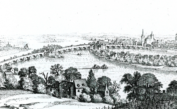 Vue du pont d'Eues à Tours (XI° siècle) sur la Loire et du château de Tours (XIII° siècle)